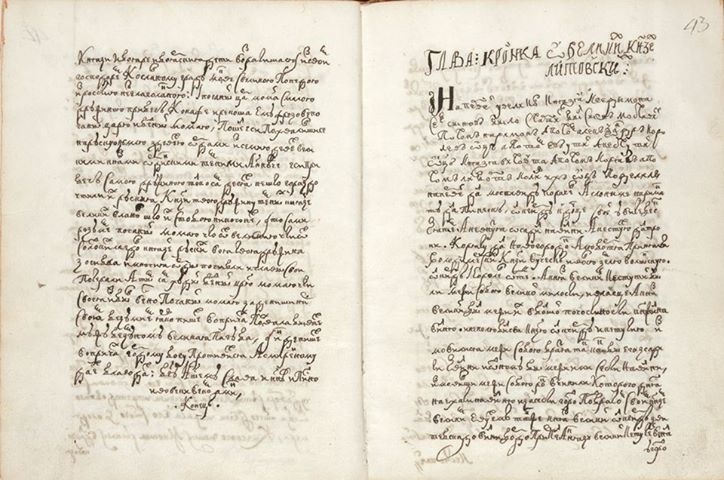 Фрагмент Баркулабаўскага летапісу